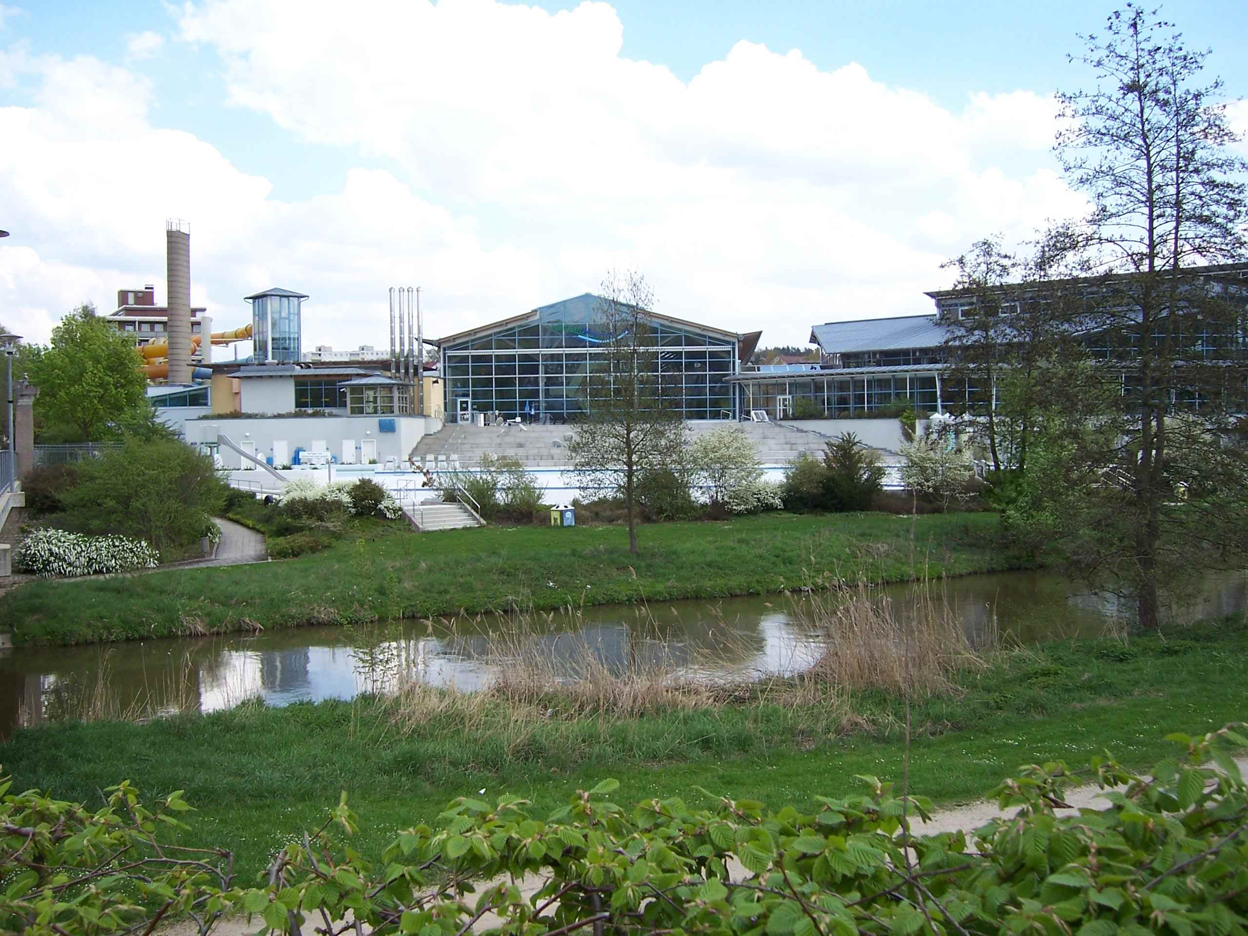 Altmuehltherme Treuchtlingen